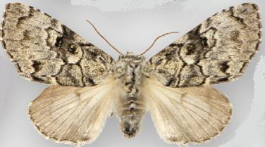 Charadra deridens female